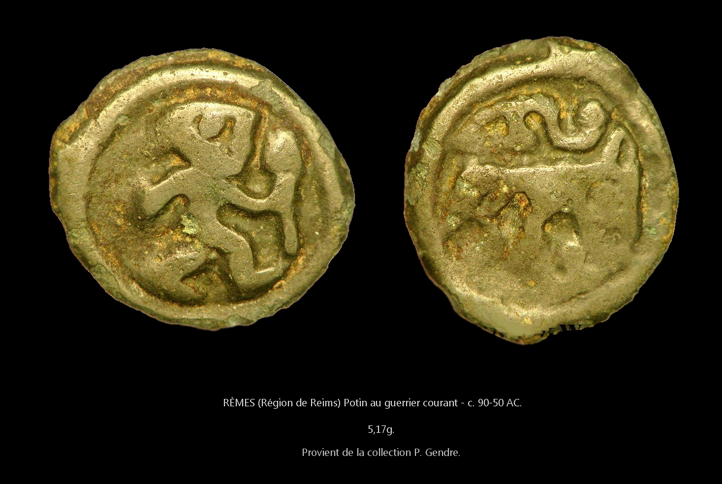 Potin au guerrier courant vers 90-50 AC.